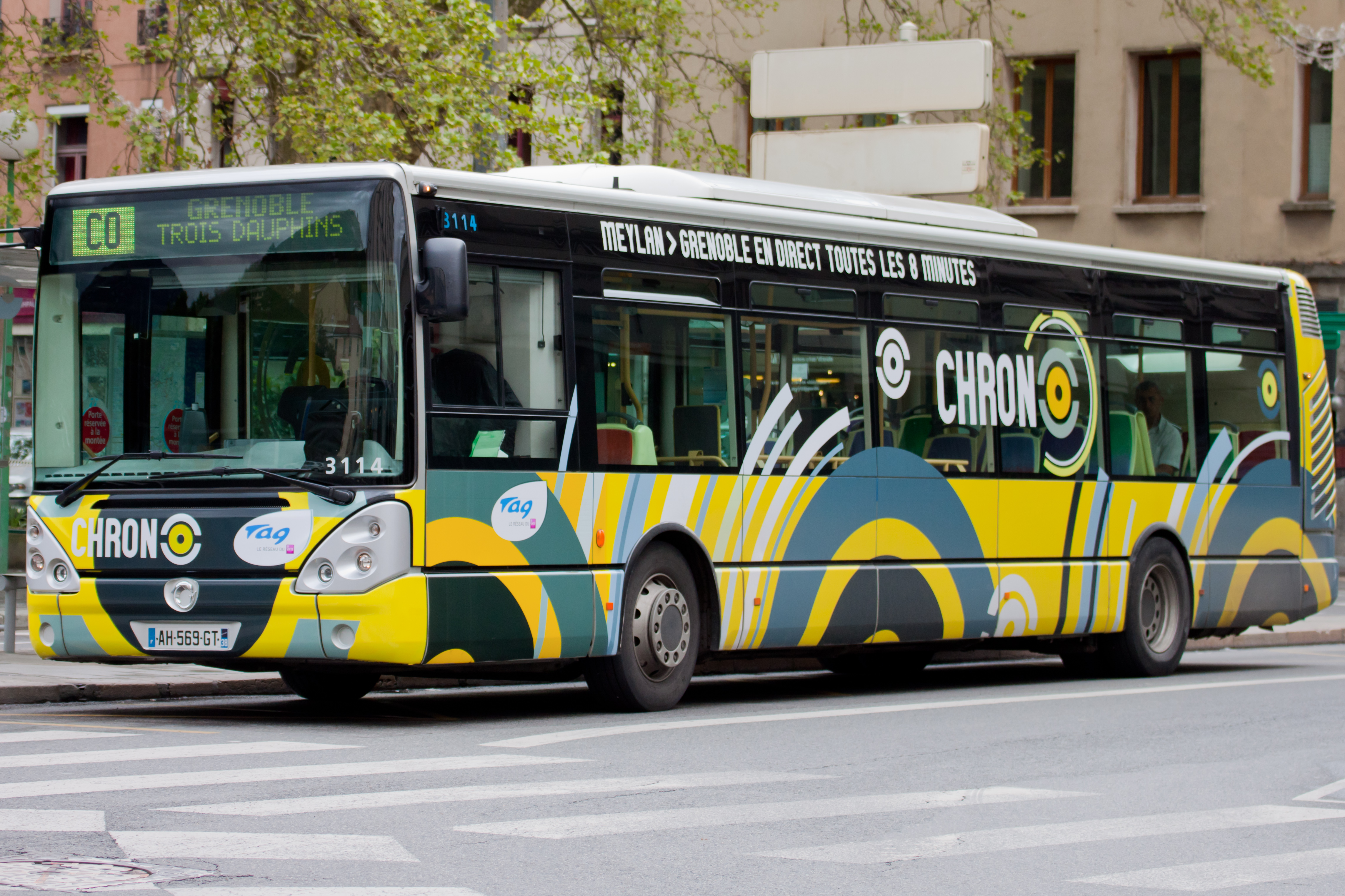 Un Irisbus Citelis 12 sur la ligne Chrono (CO) à son terminus Grenoble - 3 Dauphins, rue de Belgrade